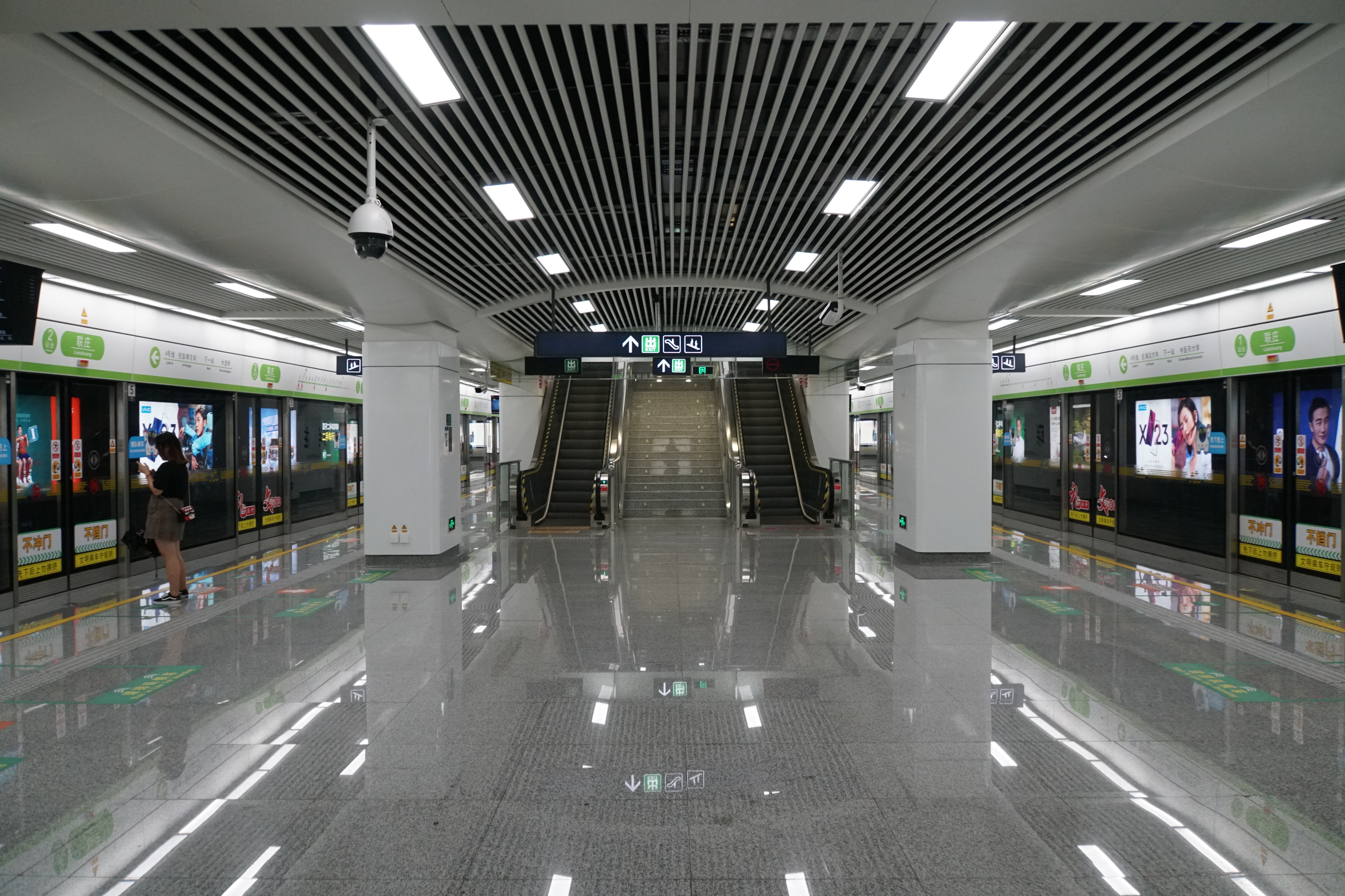 联庄站站台